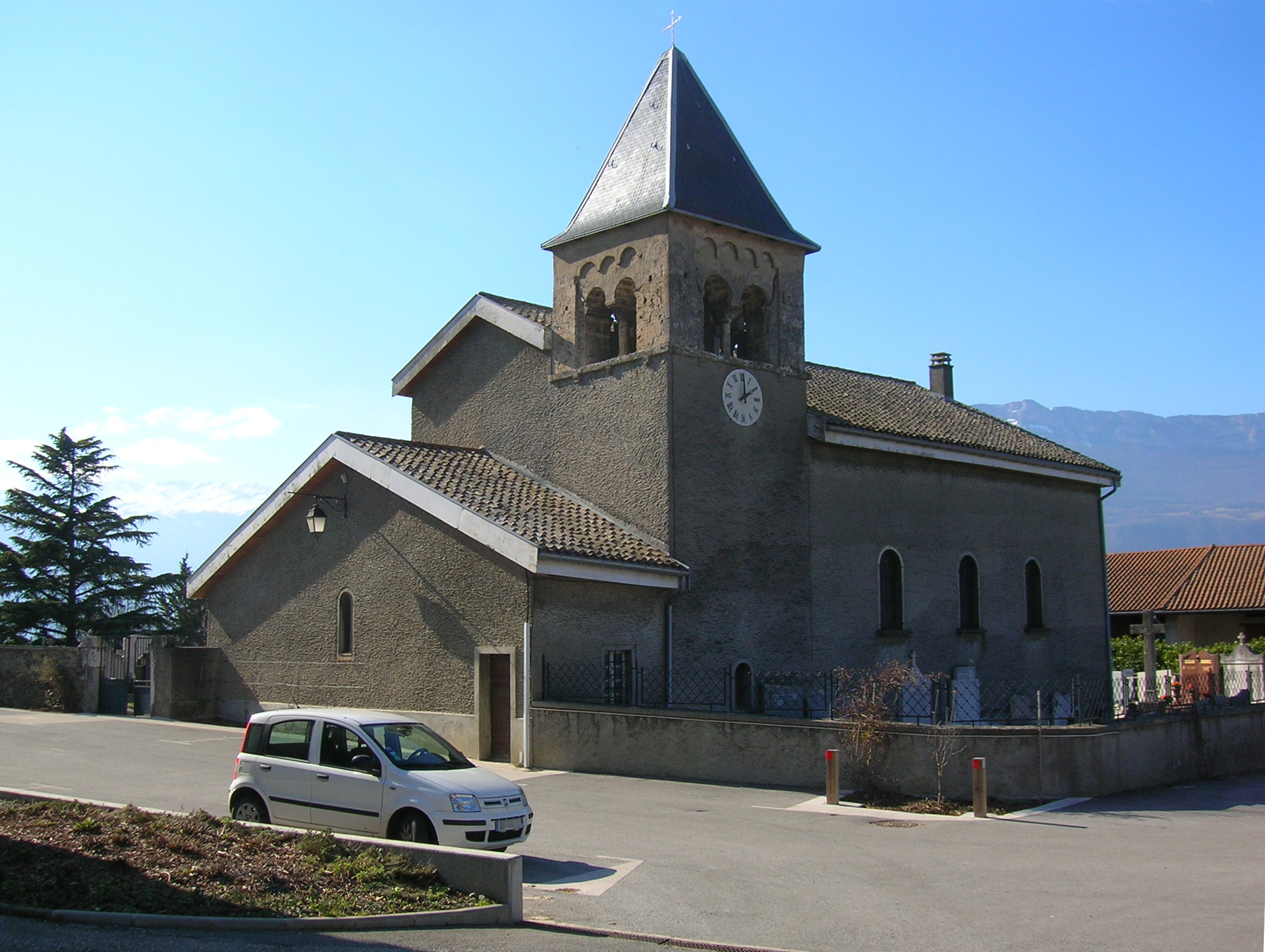 église de Champagnier, Isère, AuRA, France.